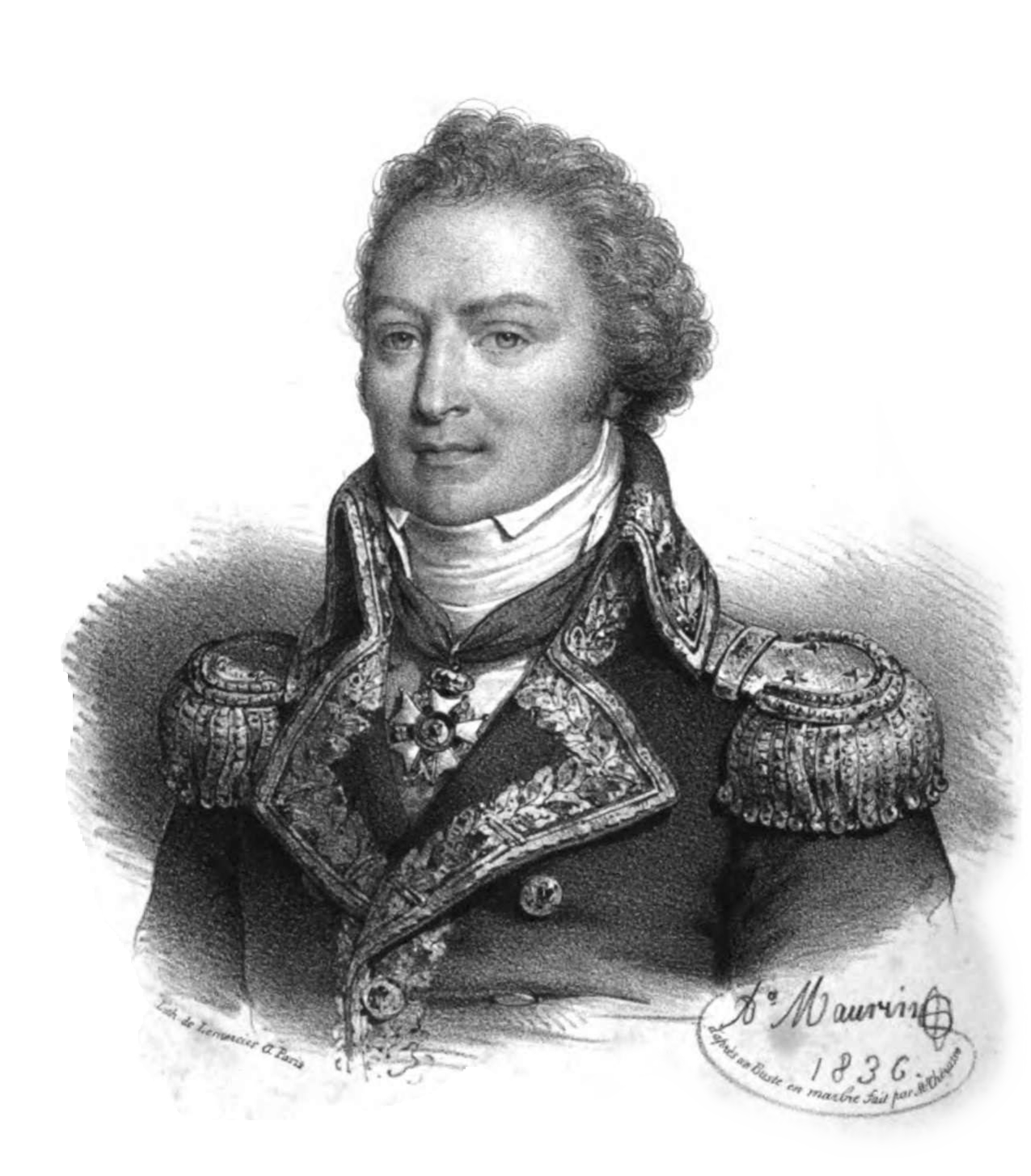 Louis-René Levassor de Latouche Tréville